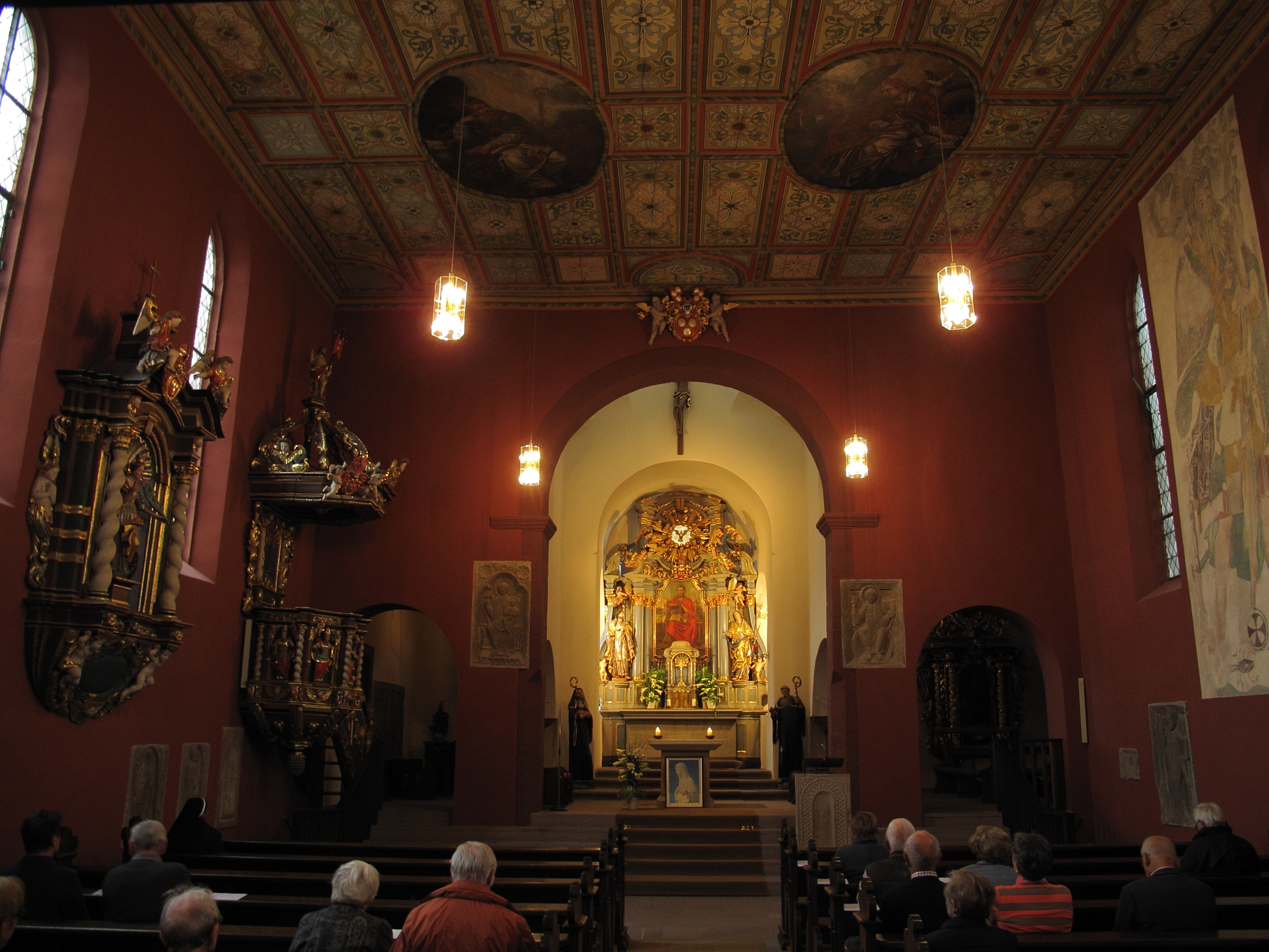 Petersberg - St.Peter (Liobakirche): Innenansicht nach Osten